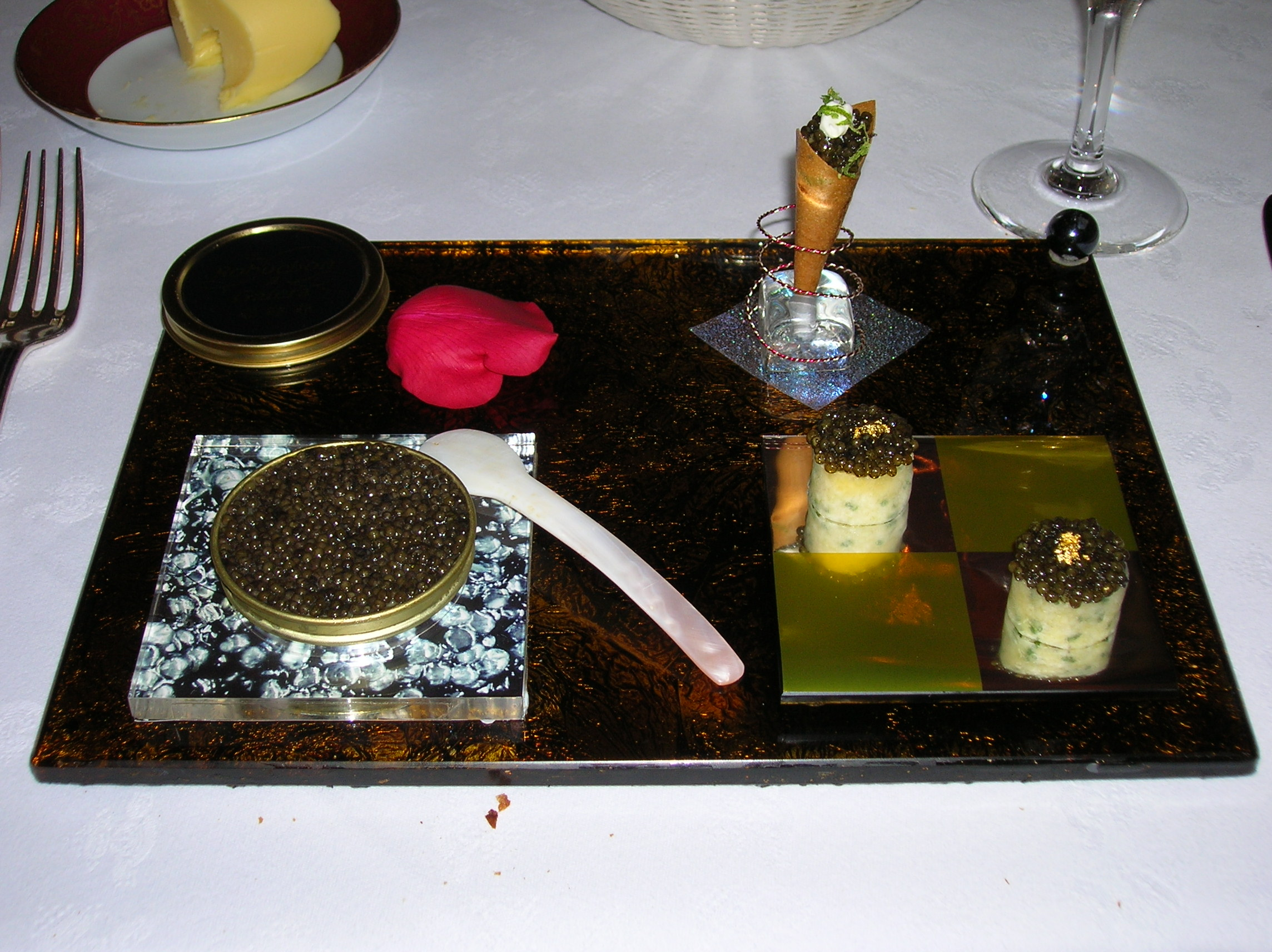 Robuchon a Galera Macau